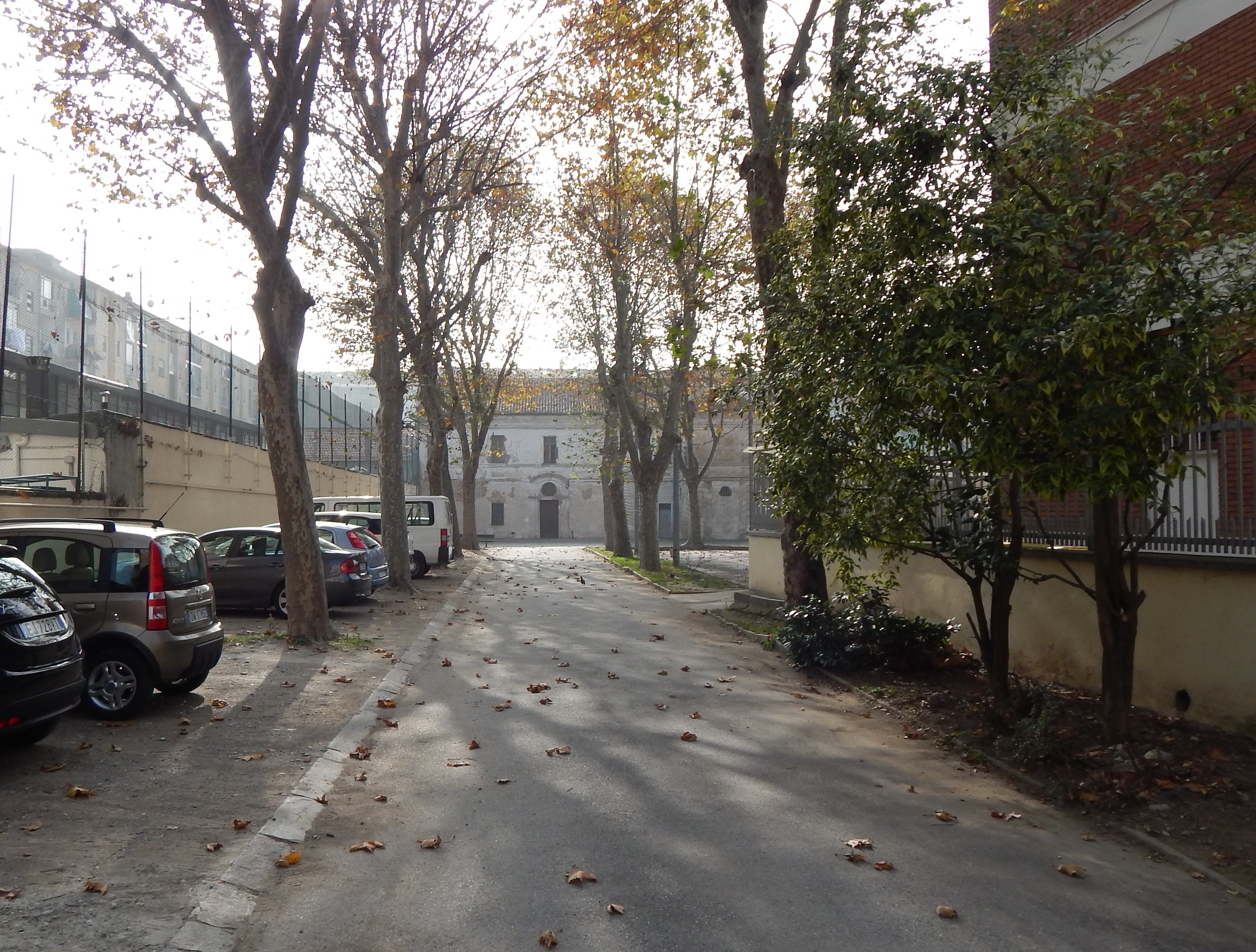 Una veduta di Borgata Lesna